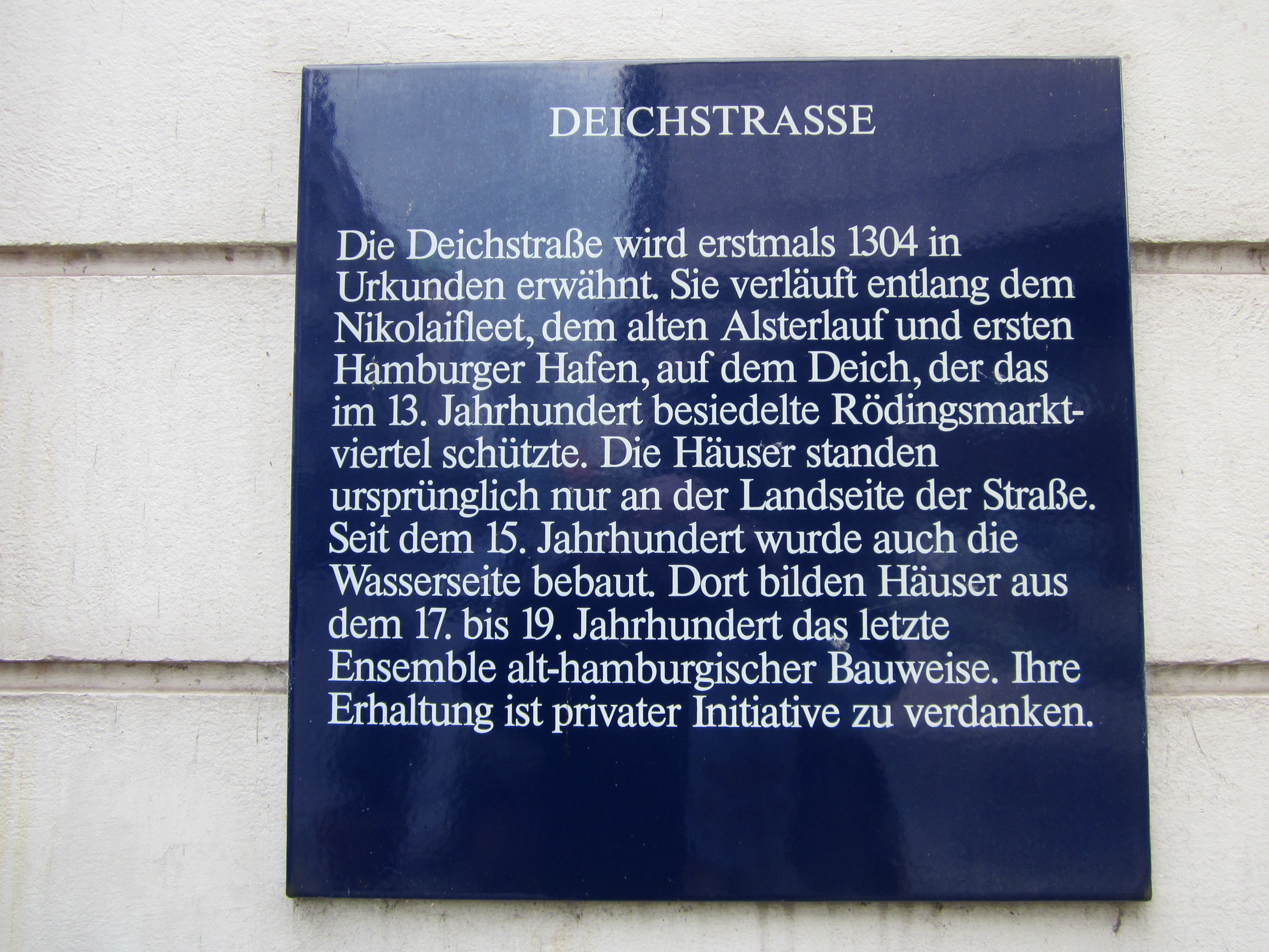 Tafel am Beginn des historischen Teils der deichstraße in der Hamburger Altstadt.